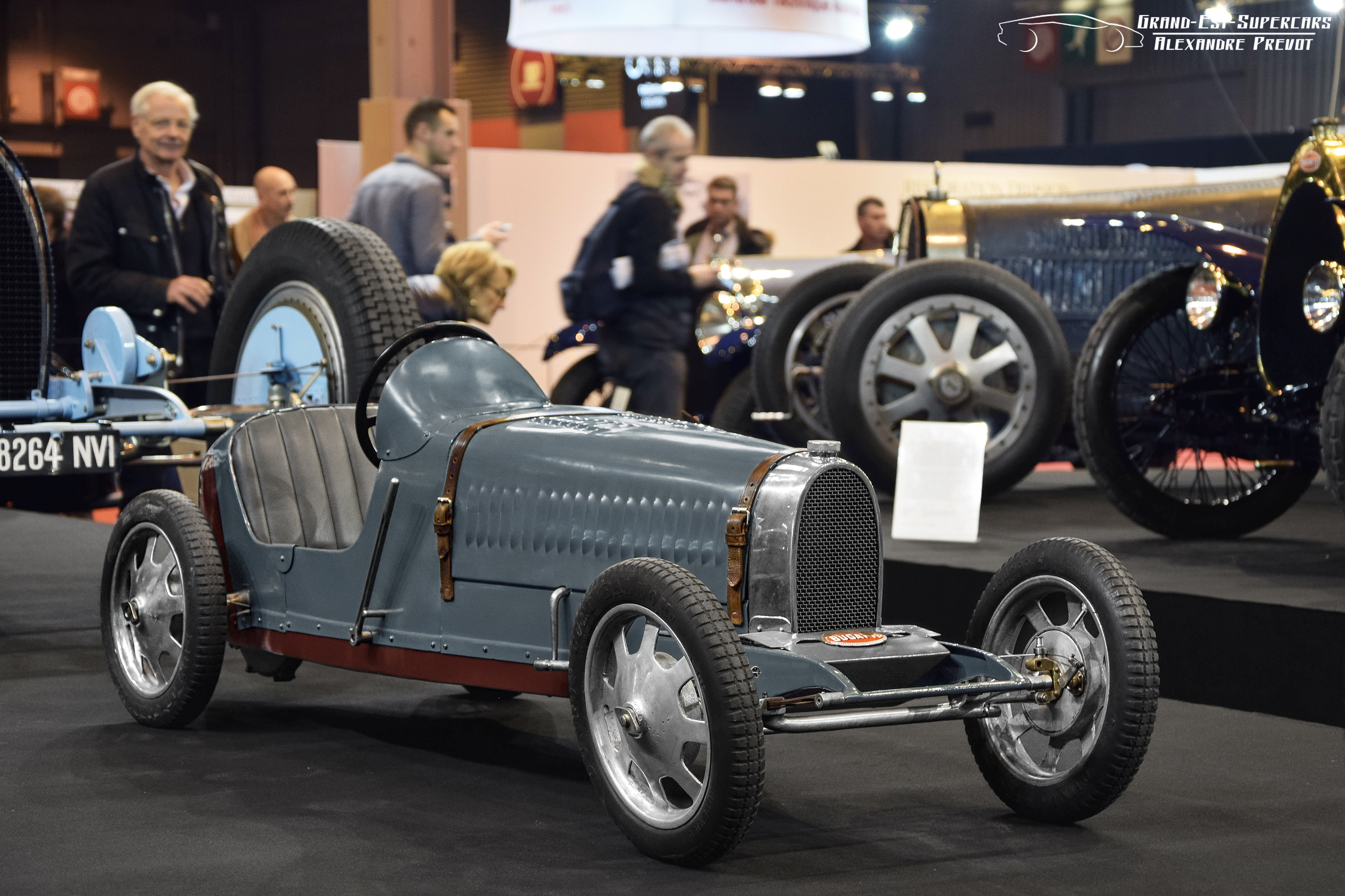 Châssis : n°288A